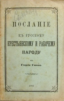 Lettera ai contadini e ai lavoratori russi (Послание к русскому крестьянскому и рабочему народу)